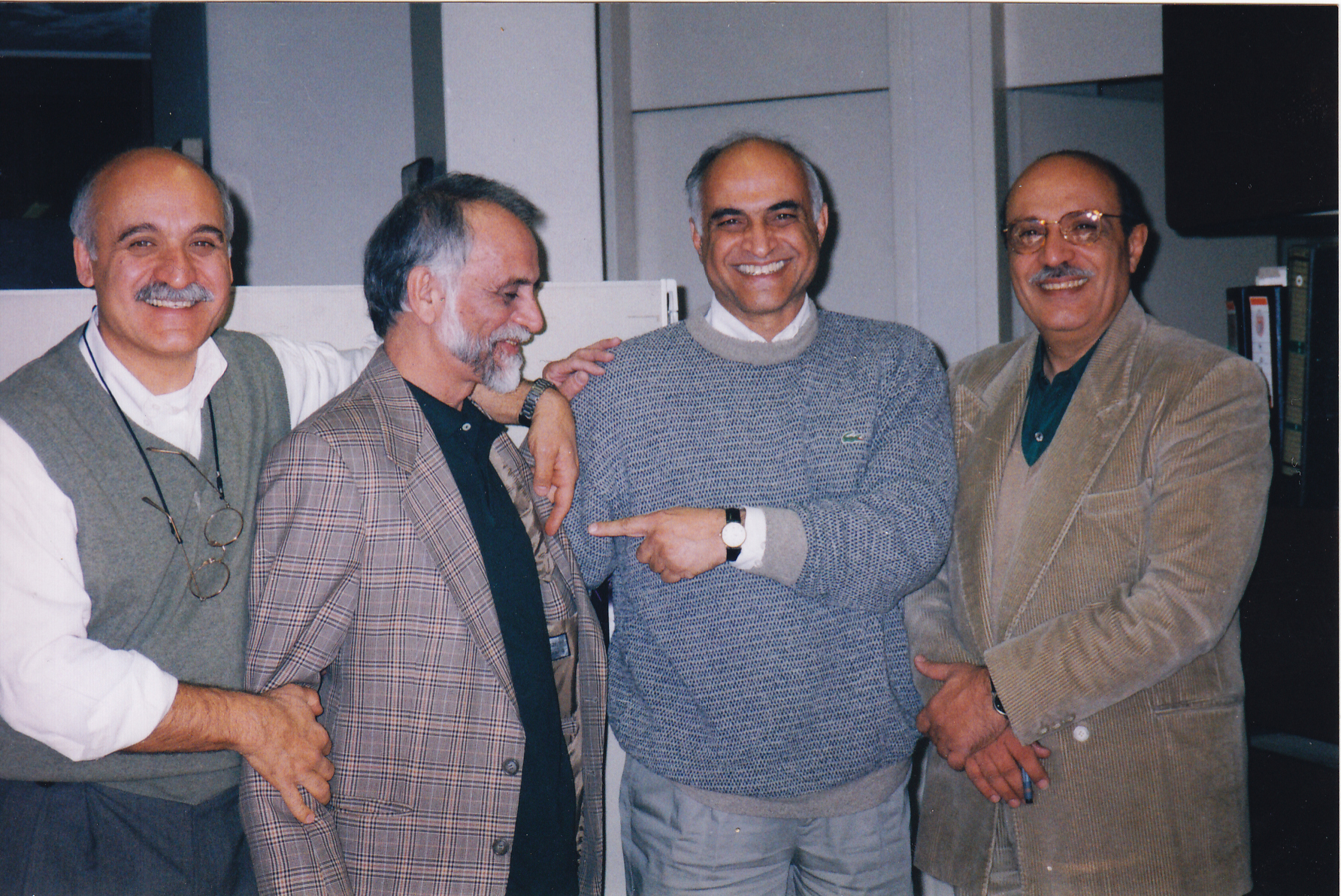 این عکس متعلق به آتلیه شارستان است